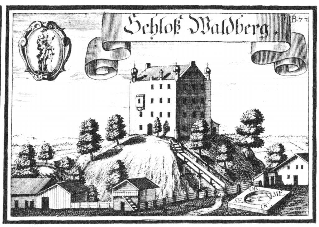 Schloss Waldberg nach einem Stich von Michael Wening (1721)